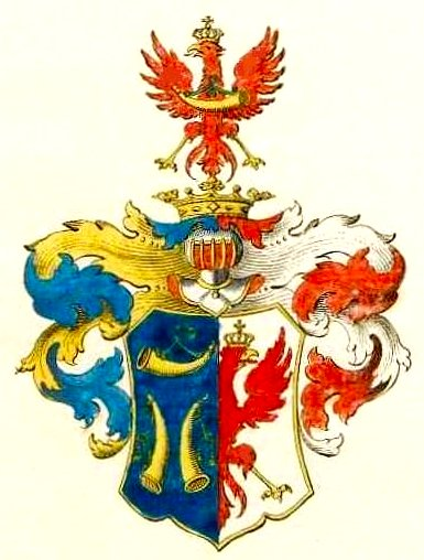 Wappen der preußischen von Jaegersfeld, einer legitimierten Nebenlinie der Markgrafen von Brandenburg-Schwedt aus dem Hause Hohenzollern, bestehend seit 1725, adelig legitimiert 1786 bzw. 1787